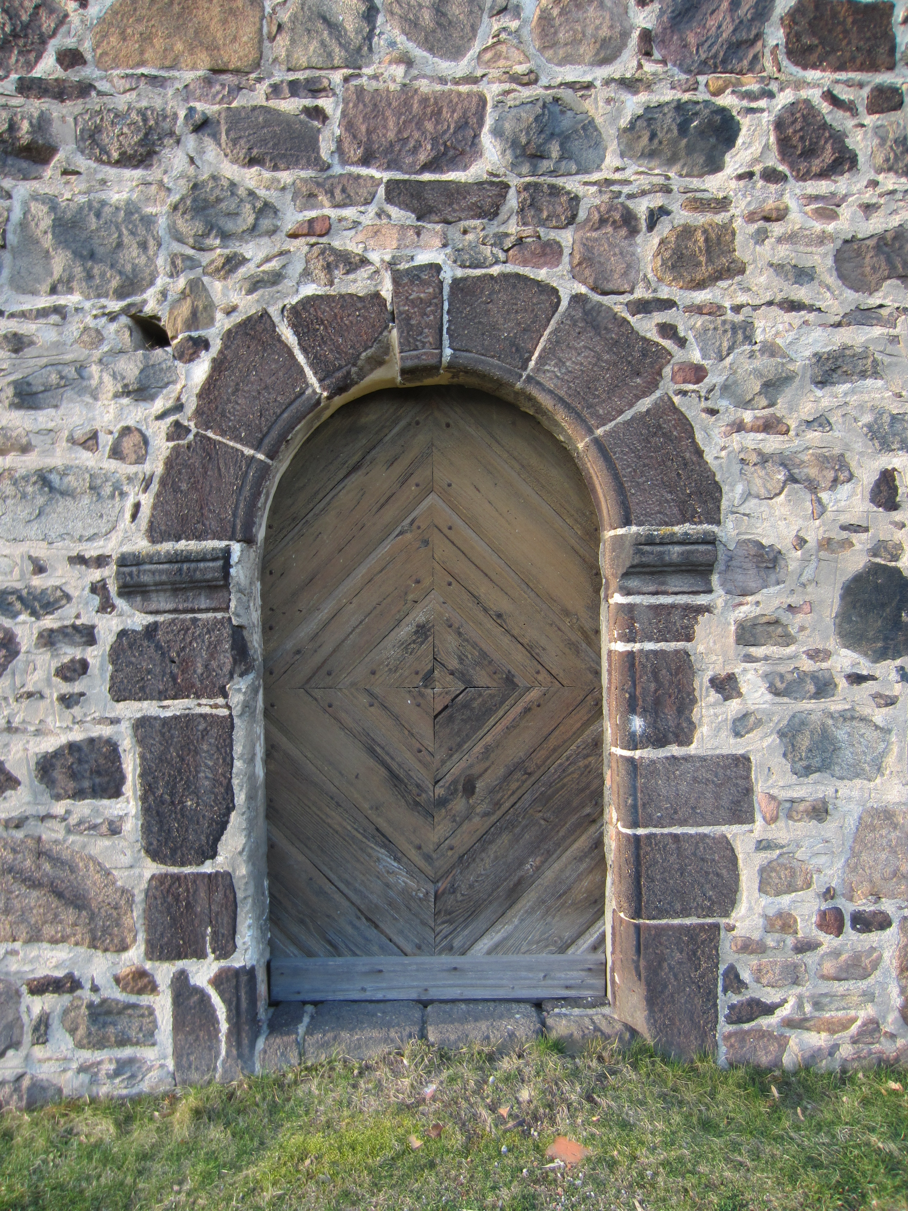 Riedebeck, Gemeinde Heideblick, denkmalgeschützte Dorfkirche, Südportal